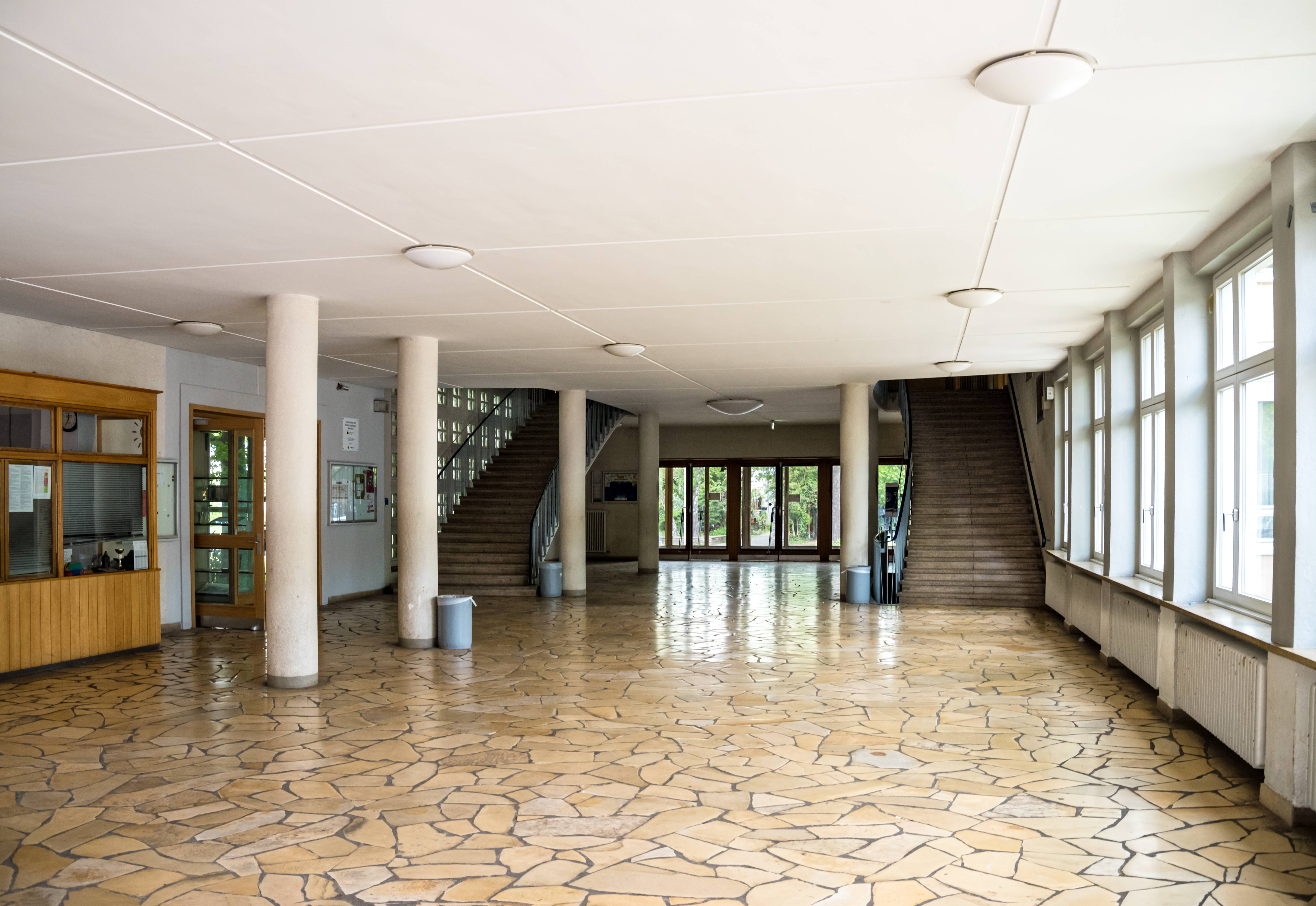 Bilder aus Bonn Das Ernst-Moritz-Arndt Gymnasium in der Endenicher Allee in Bonn-Poppelsdorf Der Neubau wurde am 12. Juni 1951 begonnen. Die ersten 12 Klassen wurden ab dem 3. November 1952 in neuen Räumen unterrichtet. Am 20. Februar 1953 wurde der gesamte Unterricht in den neuen Räumen gehalten. Die Einweihung war am 18. Juni 1953 Das Schulgebäude wurde 2006 unter Denkmalschutz gestellt, Da es "charakteristisch ist für die Schularchitektur der Nachkriegszeit" Innenansichten der denkmalgeschützten Schule